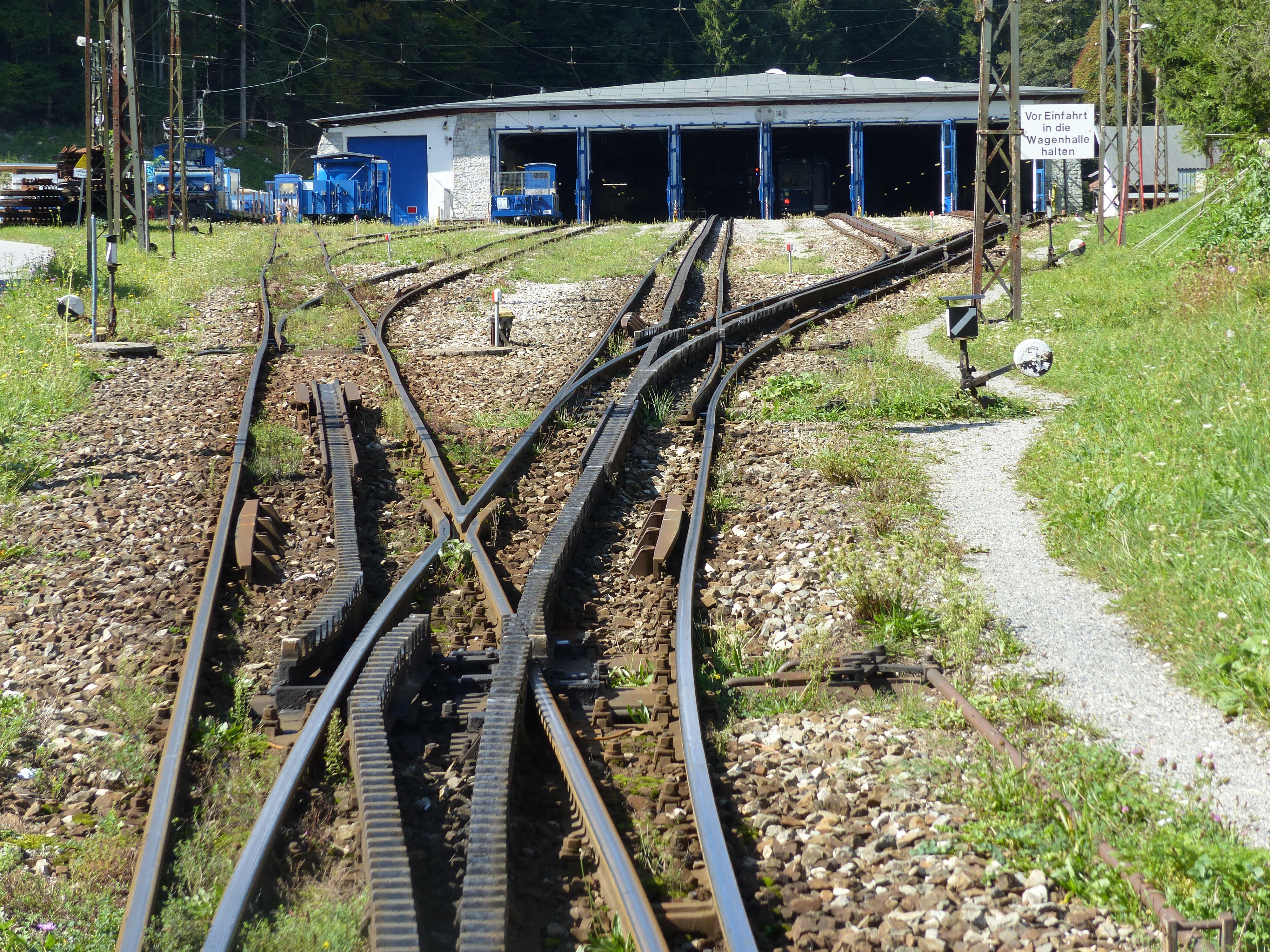 Einfahrt zum Betriebswerk Grainau der Bayerischen Zugspitzbahn